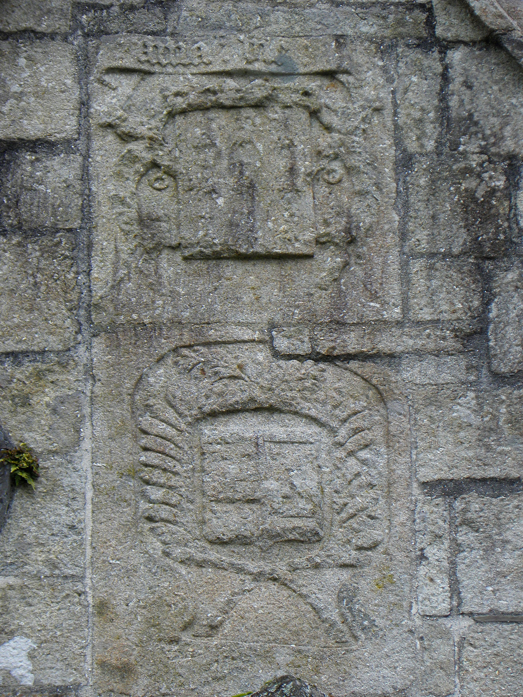 Porche sud de la chapelle de Saint-Herbot en Plonévez-du-Faou (29).